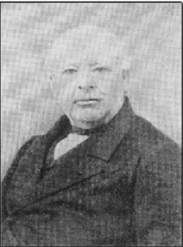 Burgemeester PJ de Smedt van Opwijk - Vlaams-Brabant - België